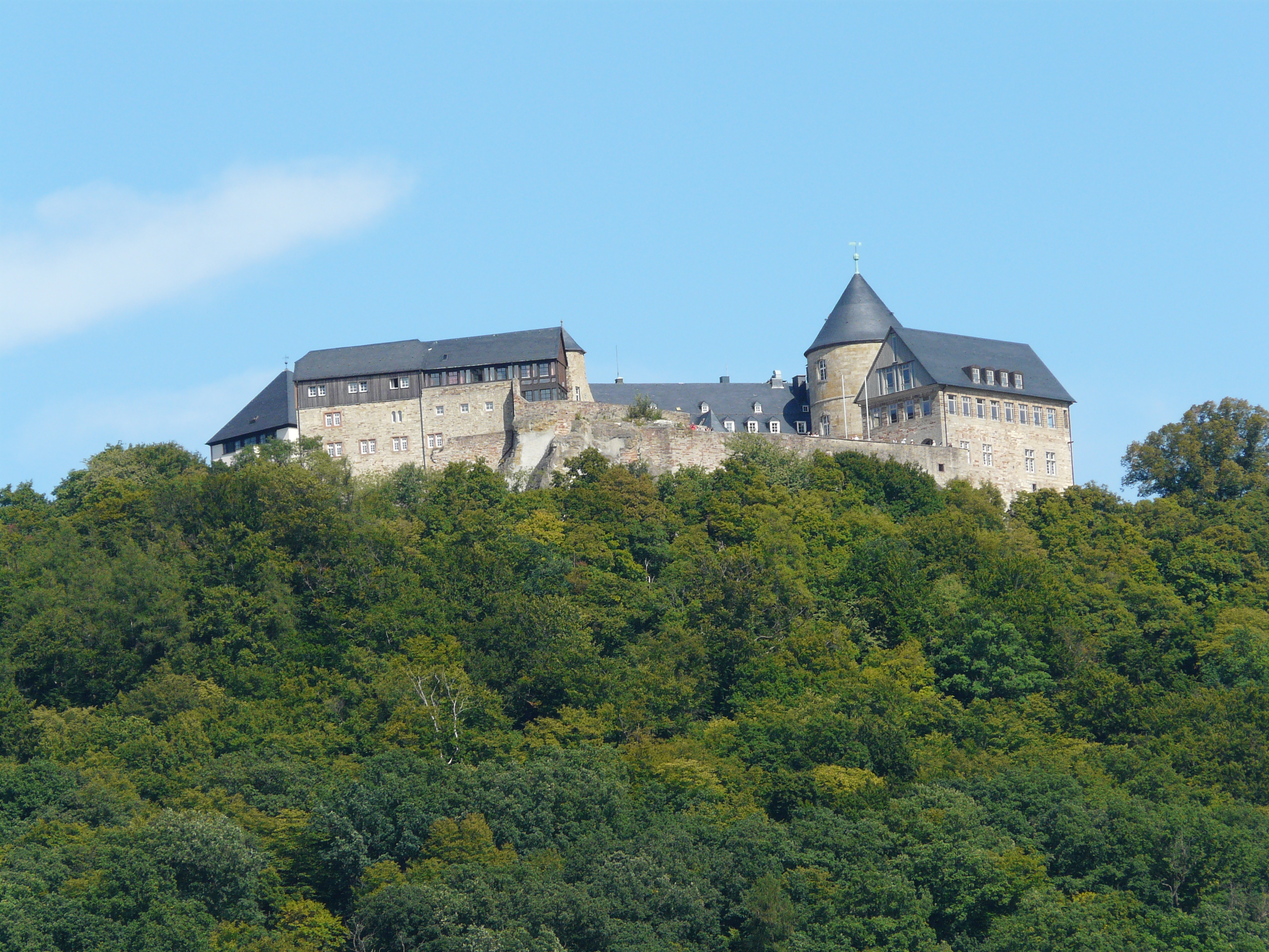 Schloss Waldeck am Edersee im August 2008